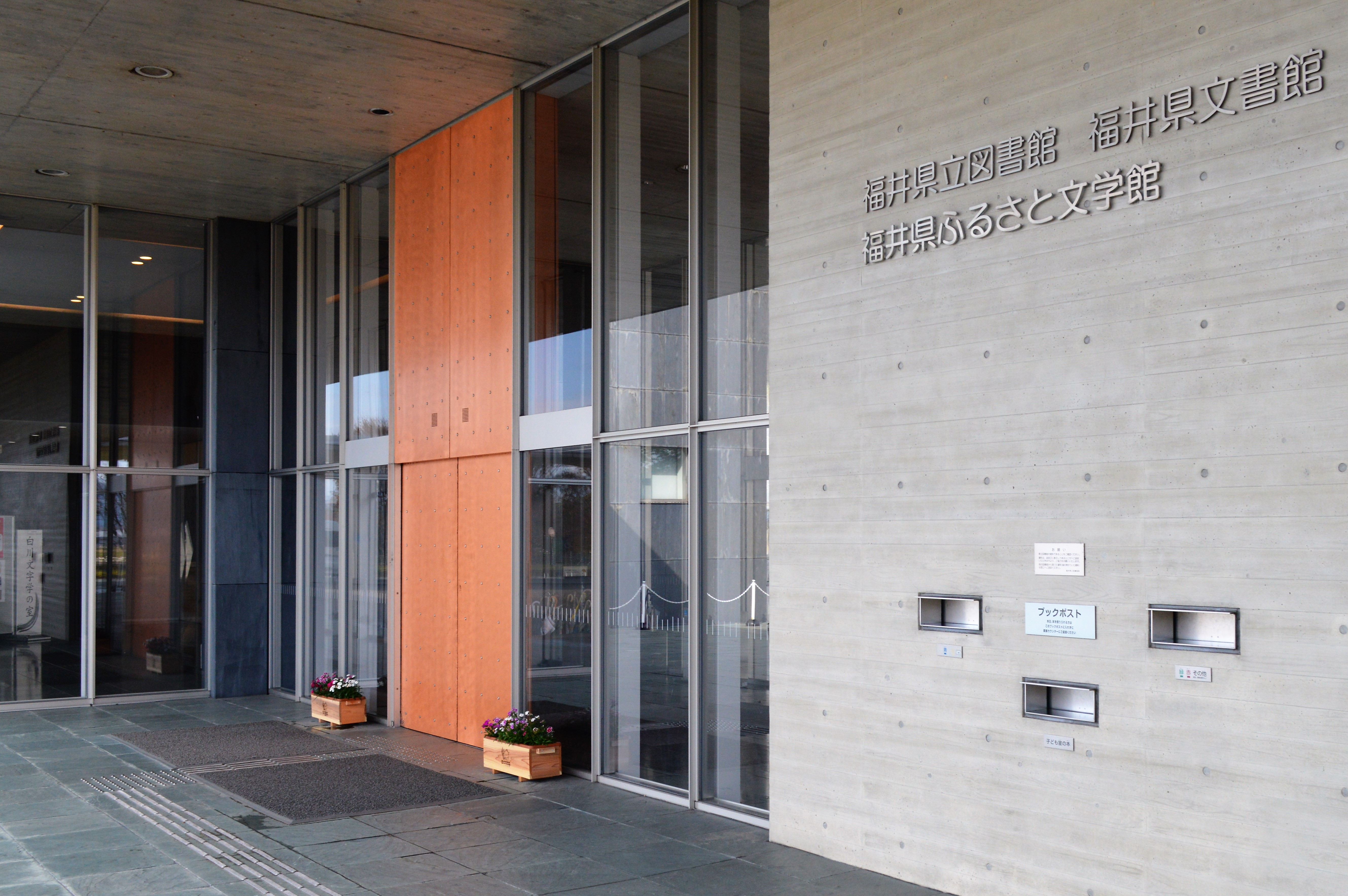 福井県福井市にある福井県立図書館。